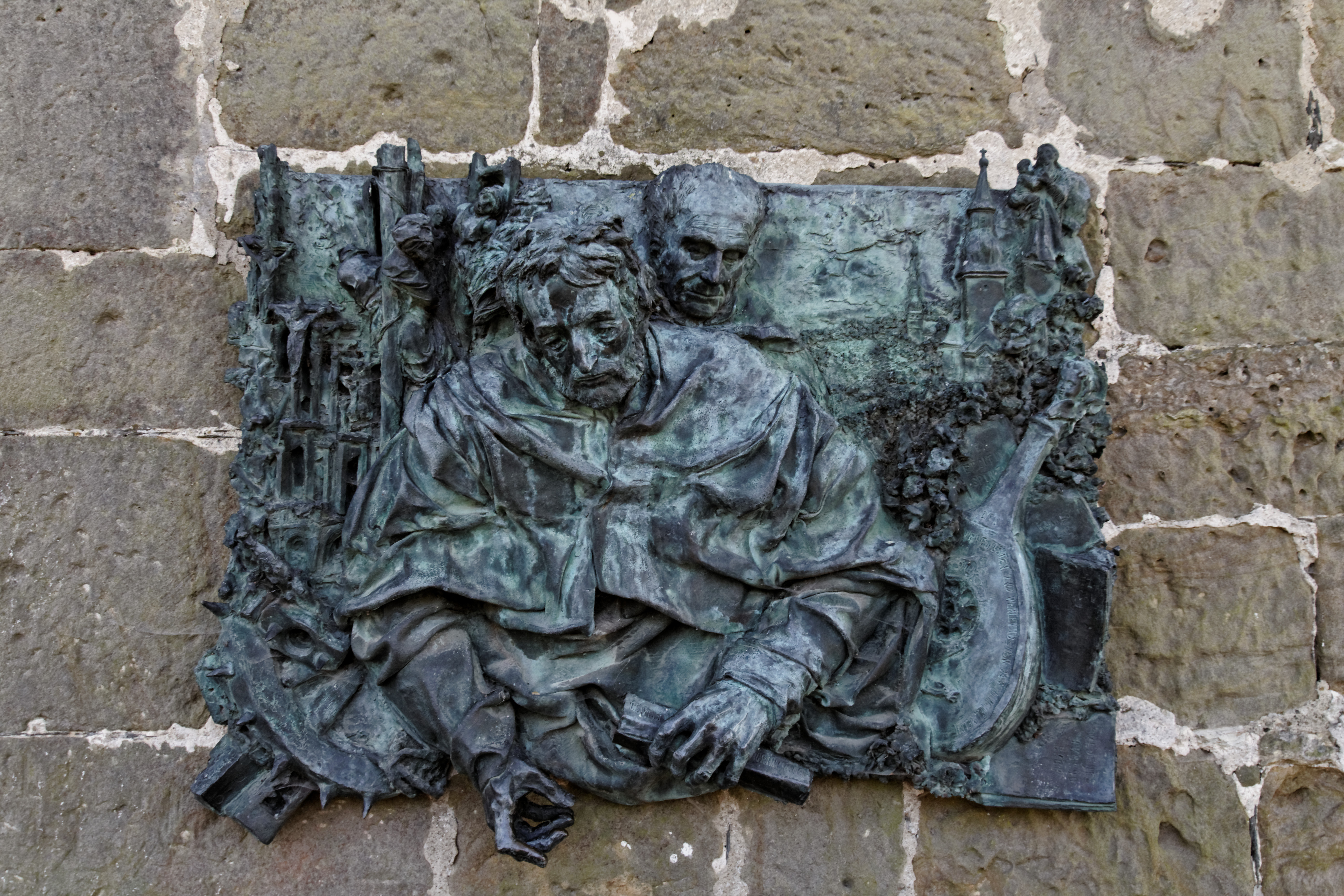 Rüthen, Gedenktafel für Friedrich Spee und Michael Stappert (Stapirius) am Hexenturm. Bronzerelief von Bert Gerresheim (1991).